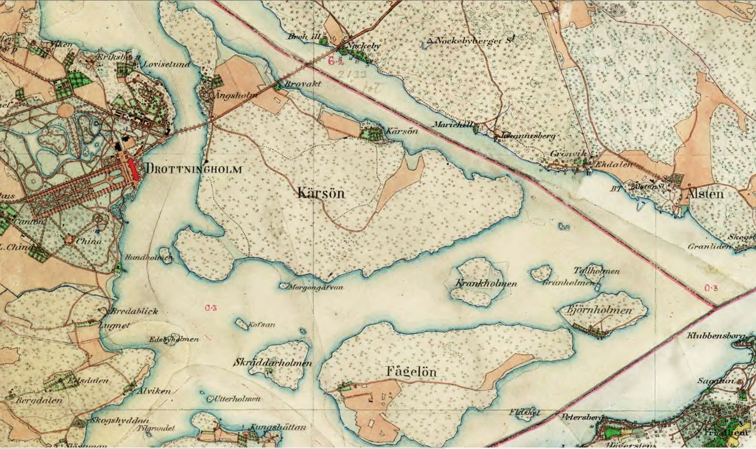 Del av Häradsekonomiska kartan med bland annat öarna Kärsön, Fågelön, Björnholmen och Skräddarholmen